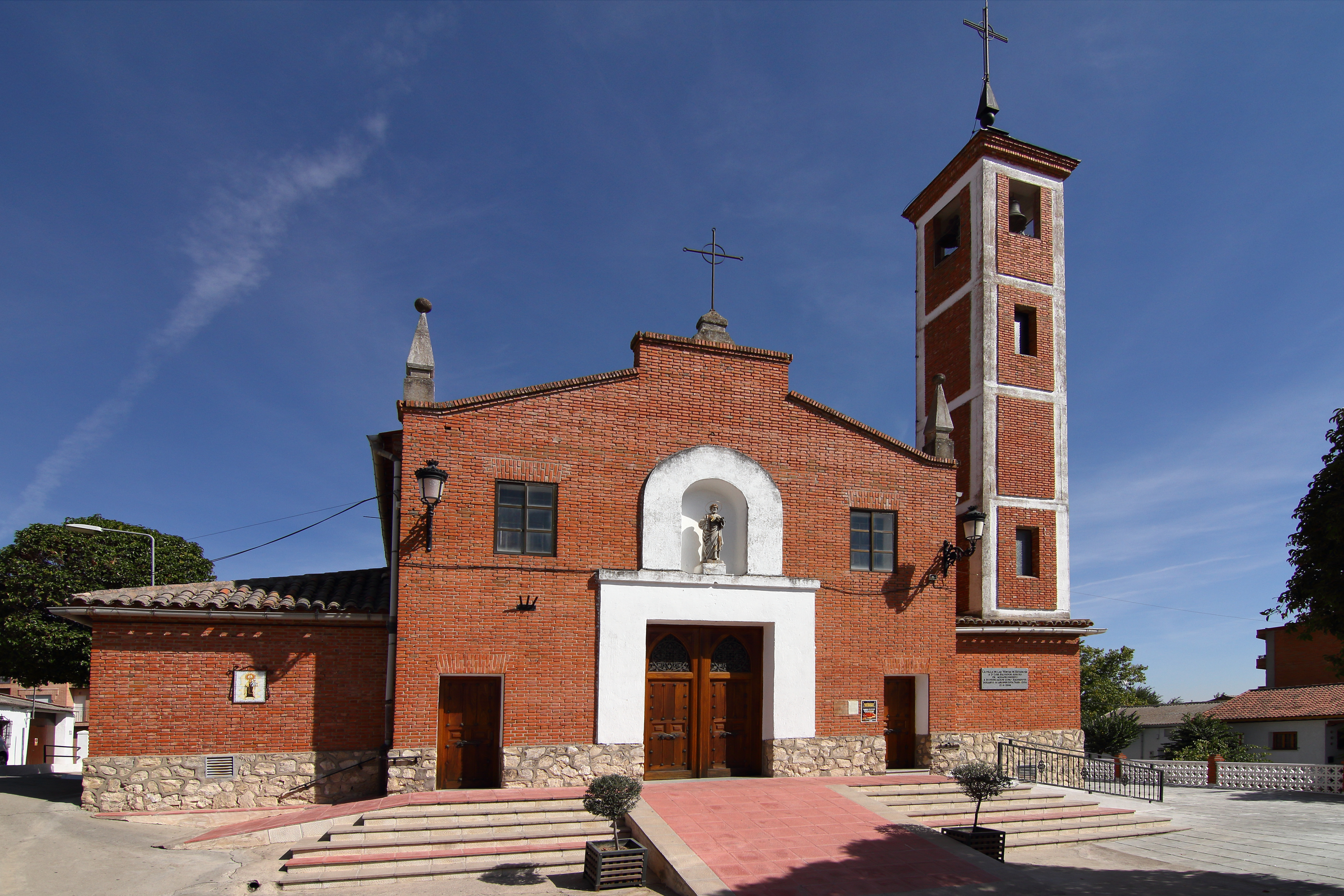 Iglesia de San Pedro Advincola en Las Ventas de Retamosa